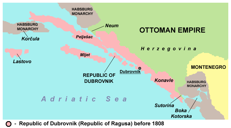 Historic map of the Republic of Dubrovnik (Republic of Ragusa), before 1808. Povijesna karta Dubrovačke republike, prije 1808. Istorijska karta Dubrovačke republike, pre 1808.